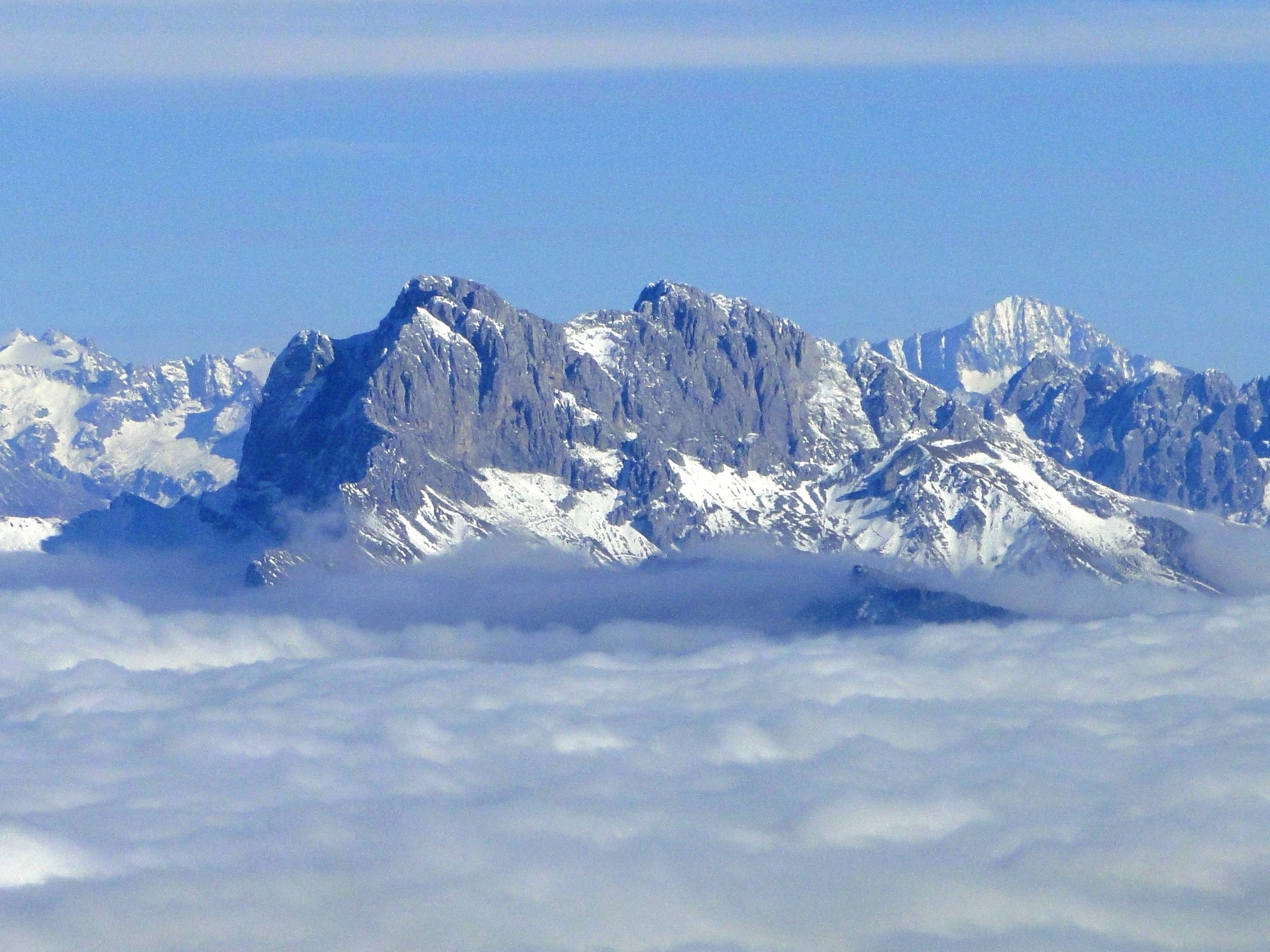 La Presolana vista dal monte Alben, Prealpi Bergamasche (BG)